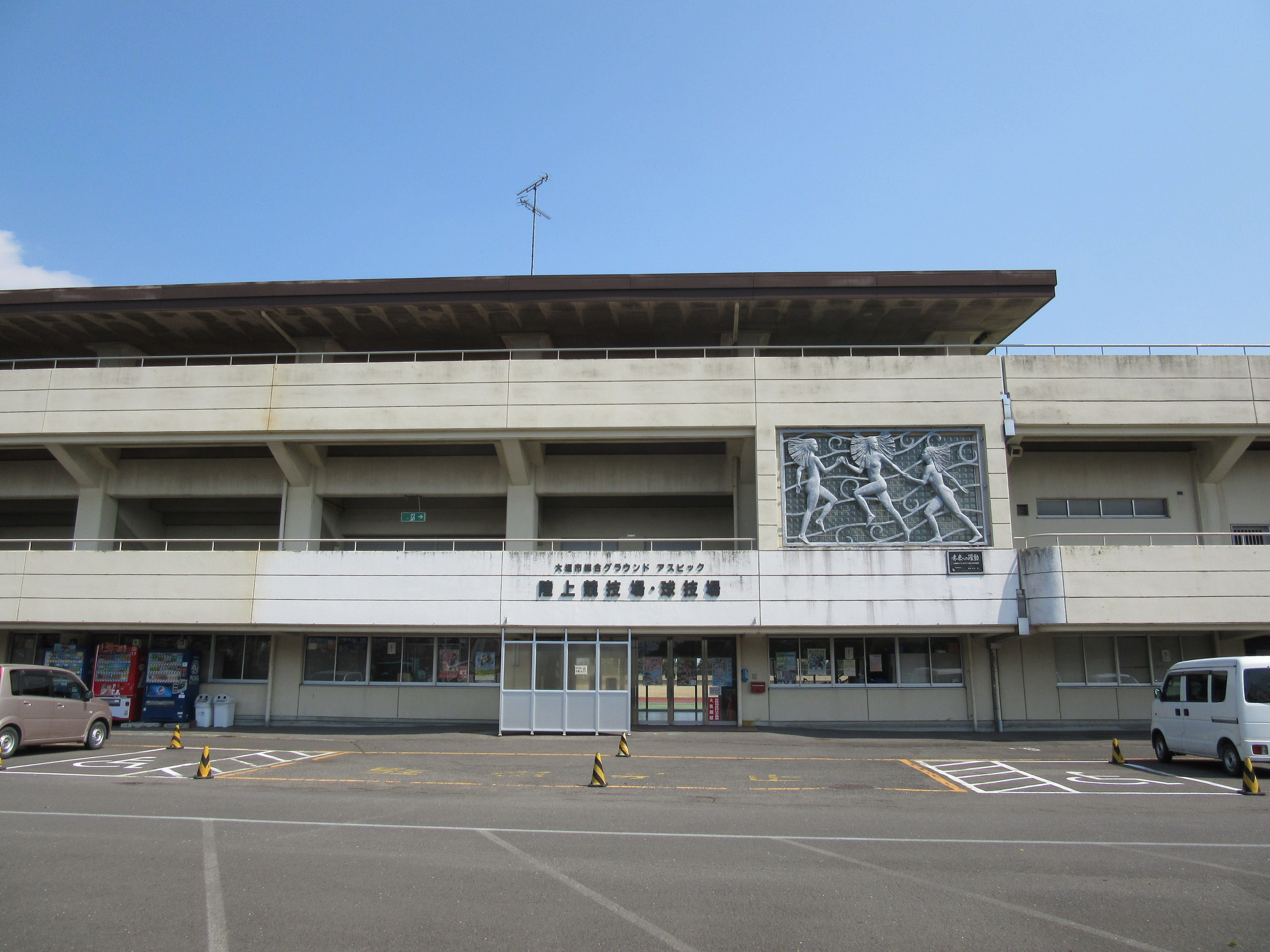 浅中公園陸上競技場